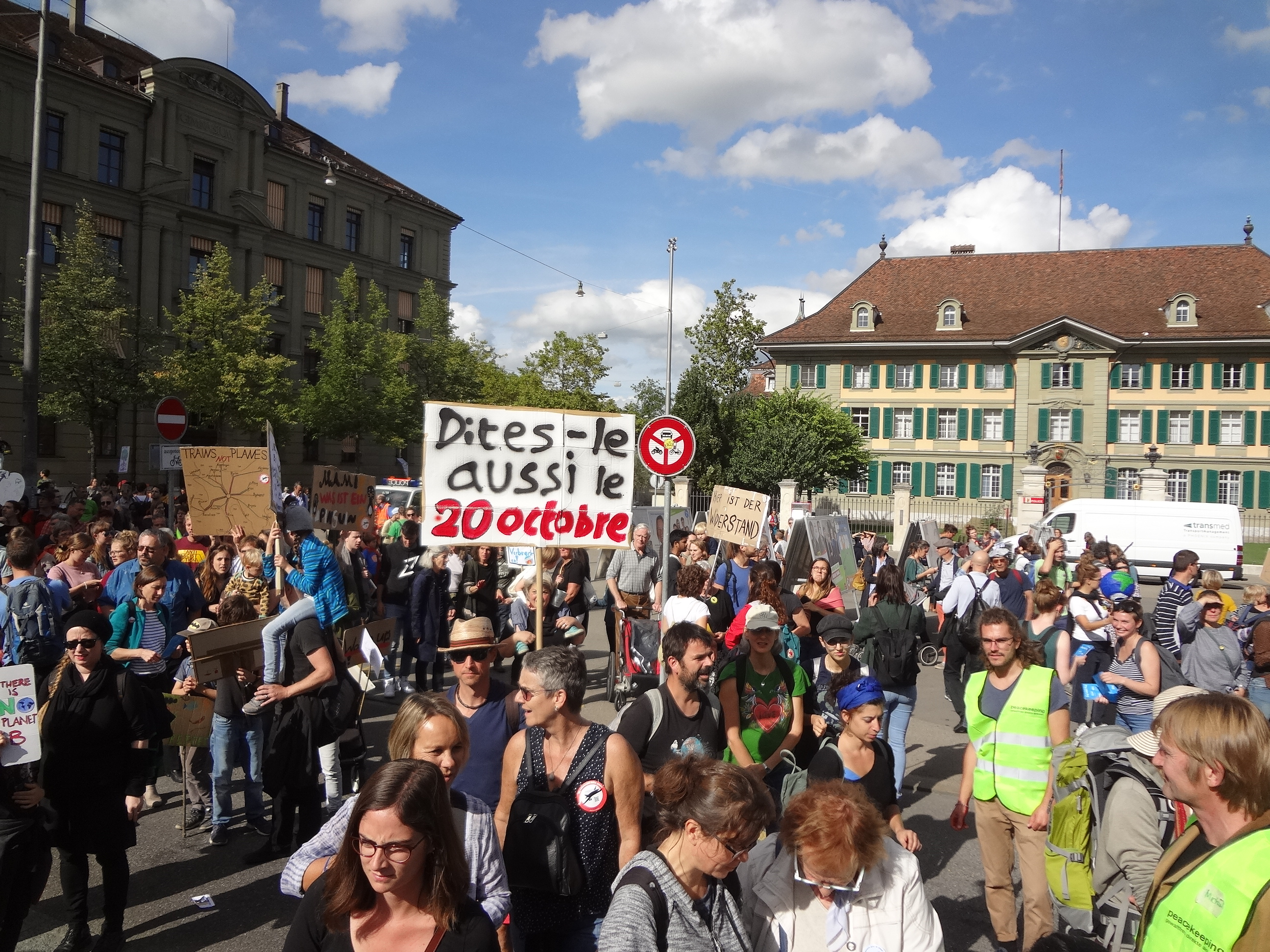 Manif climat à Berne 28 septembre 2019. Au bas de la Waisenhausplatz.